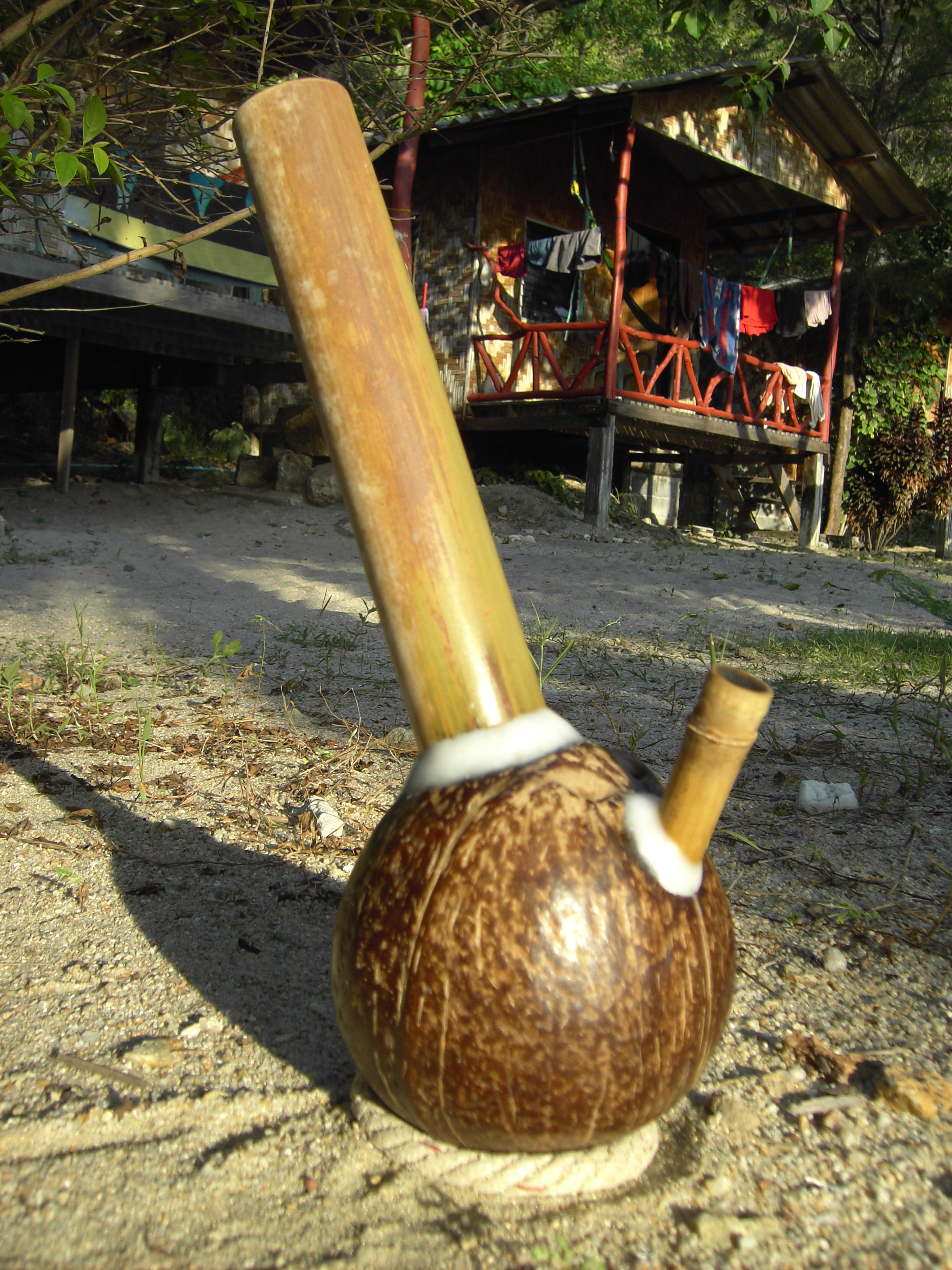 Selbstgemachte Bong aus Bambus und einer Kokosnuss